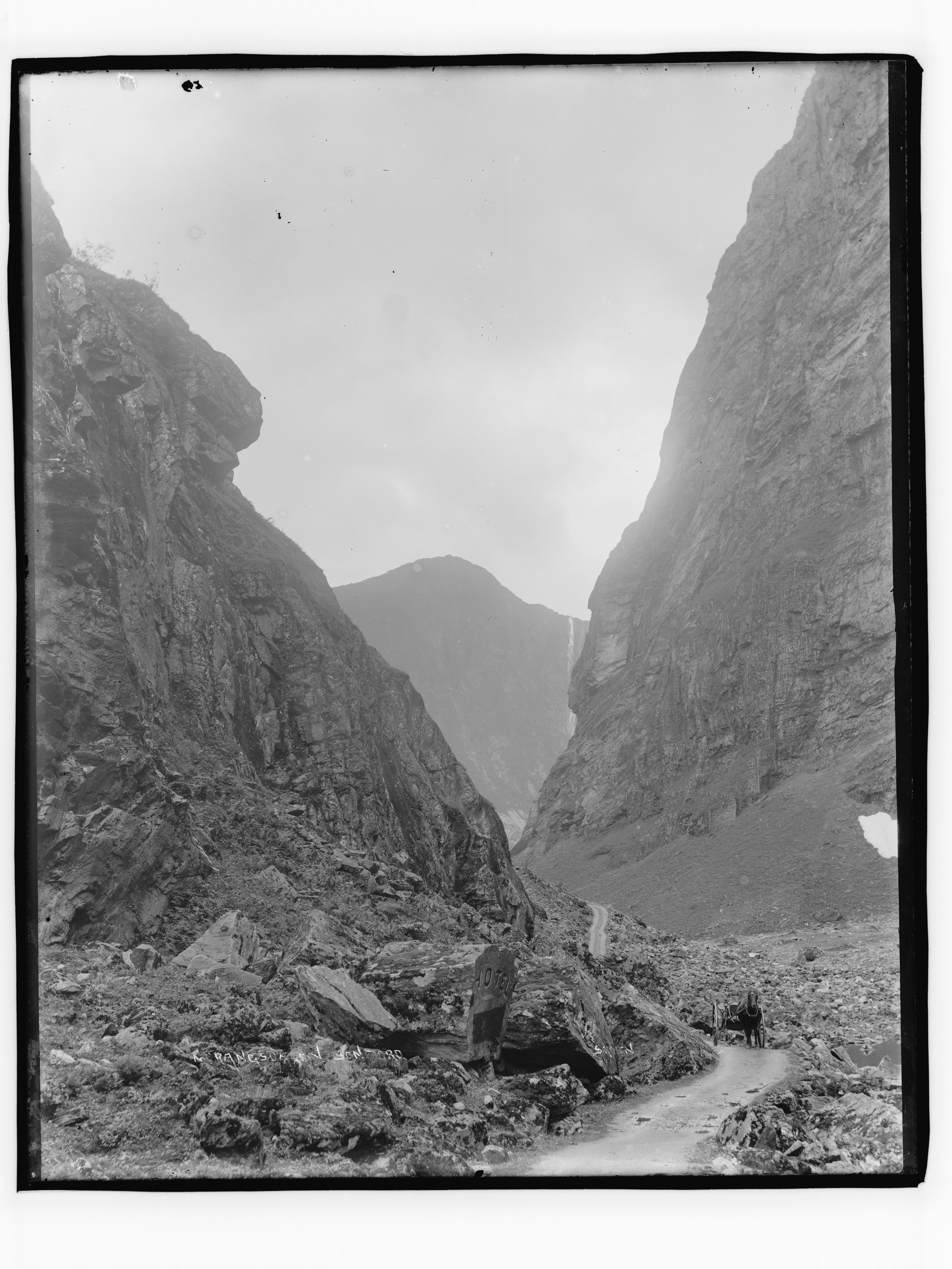 «Norangsdalen. Sondfiord» Påskrift negativ: Norangsdalen. Sondfiord Skøien Påskrift konvolutt: Kærrevei fra Krerangssundet [Riksantikvaren] Glass svart/hvitt Kollodium tørrplate Konv. 24x32 cm